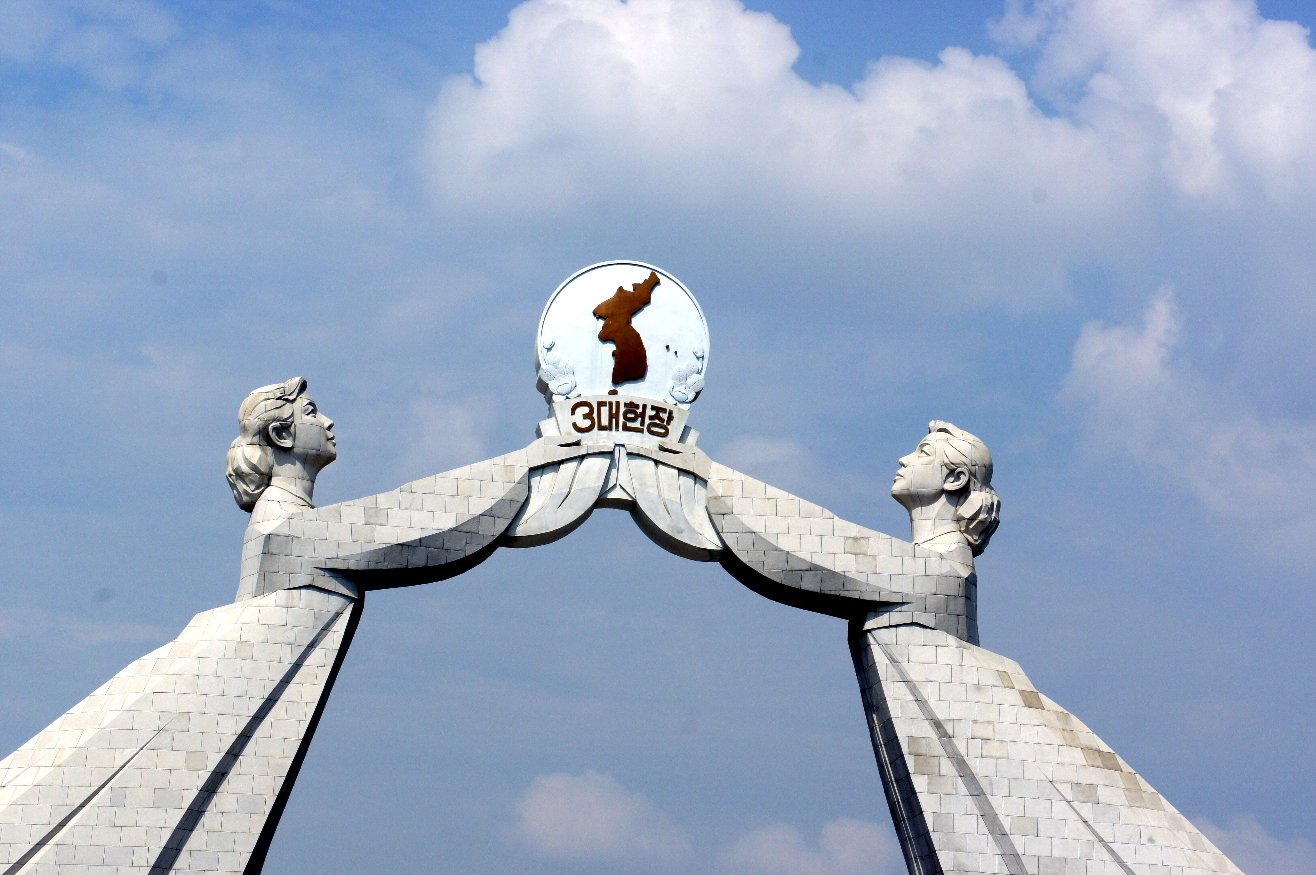 Arco de la Reunificación, Piongyang, Corea del Norte. Arco que simboliza la reunificación de las dos coreas.